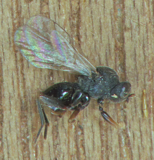 Andricus kollari, galwesp uit knikkergal op zomereik